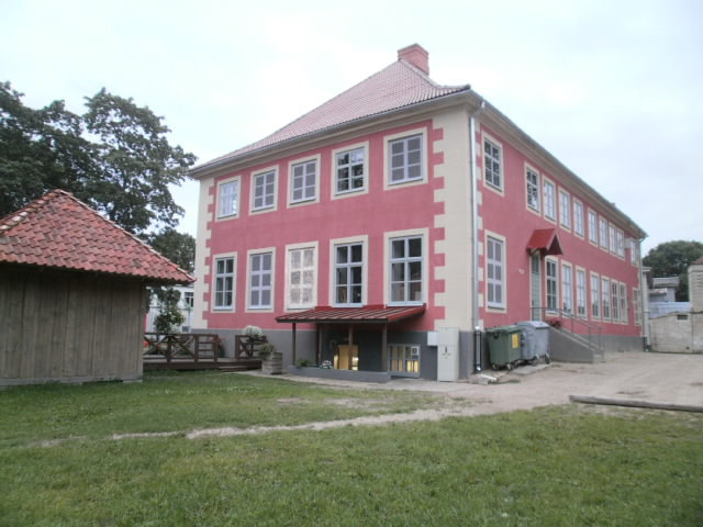 Muuseumihoone linnusevaremete kõrval. Endine linnavalitsus.